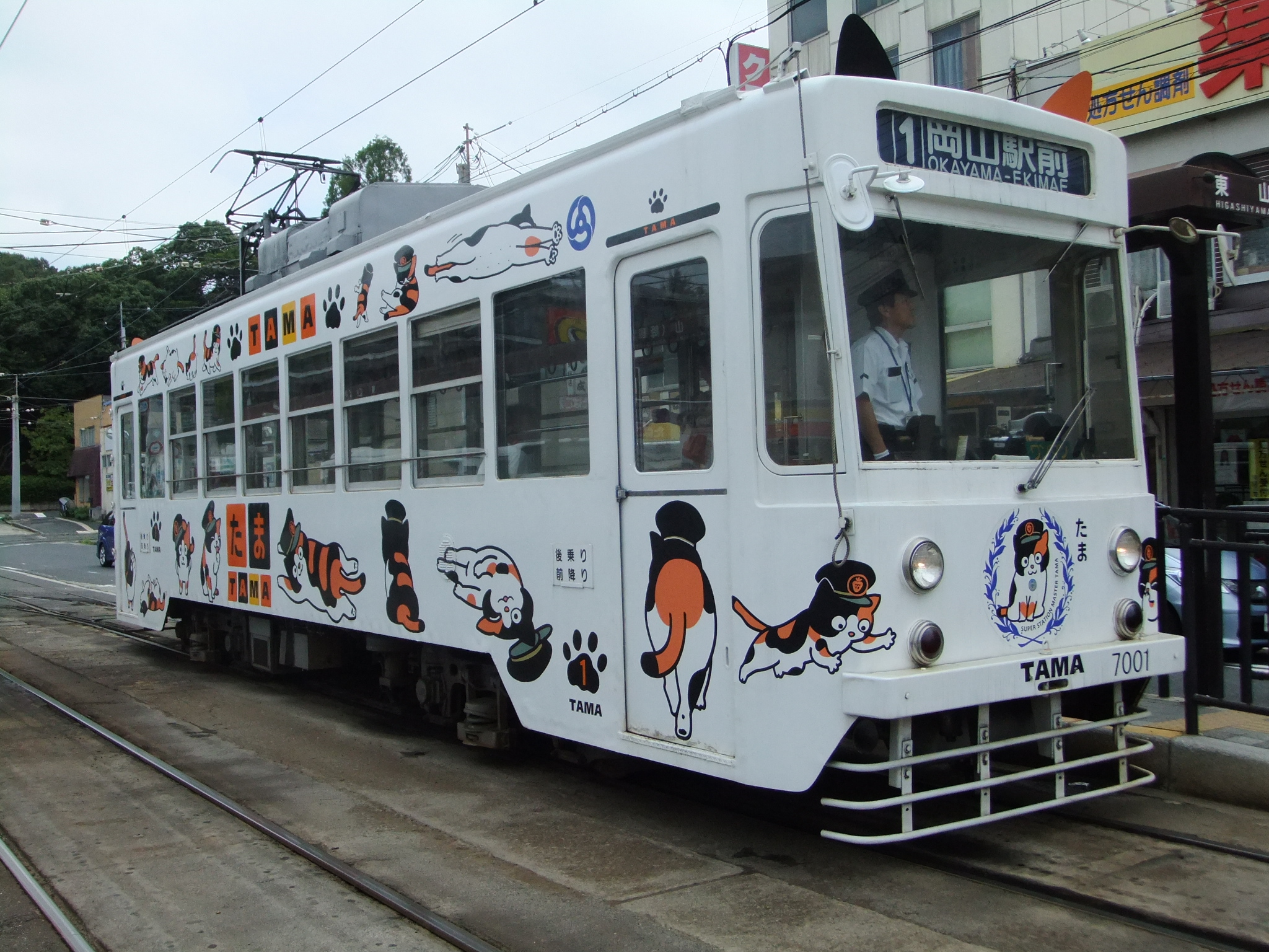 岡山電軌7001形 たま電車（２代目）